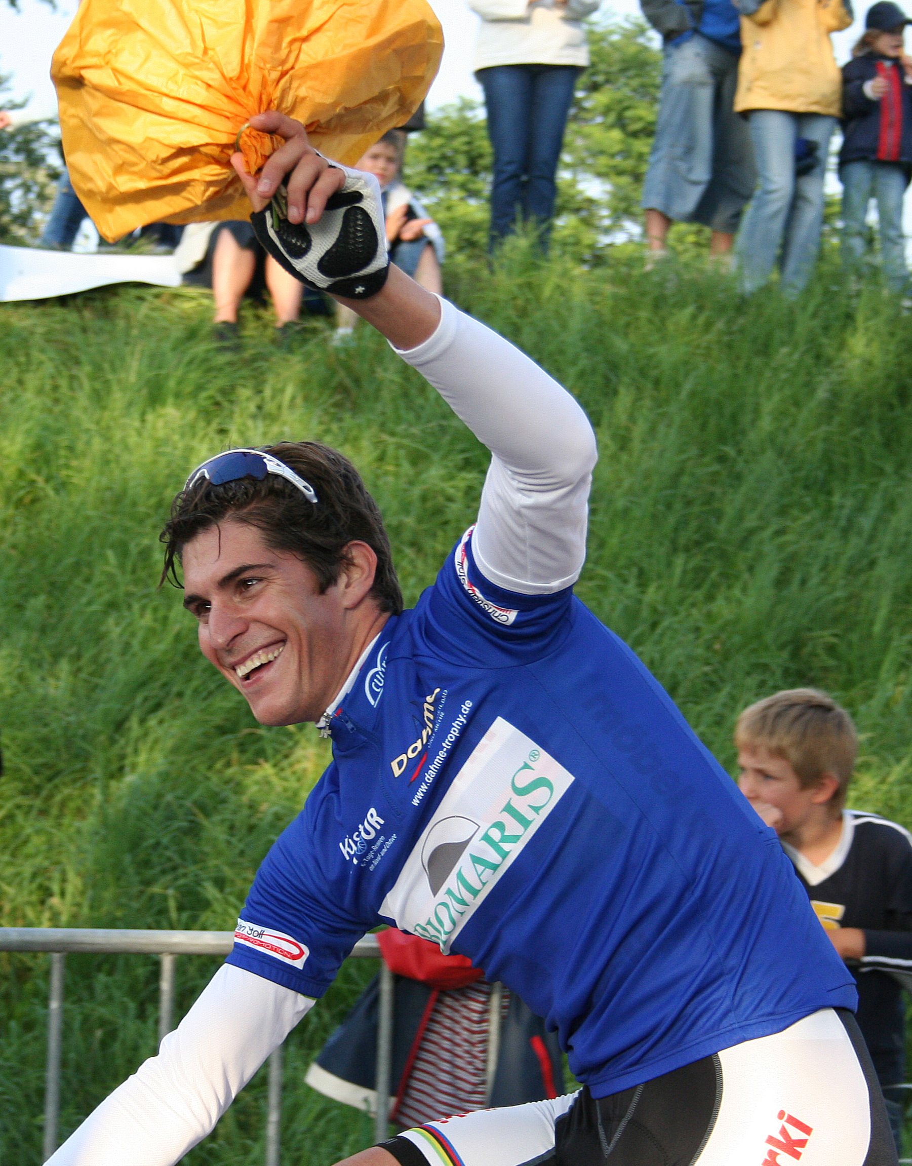 Franco Marvulli bei der Dahme (Holstein) Trophy 2007